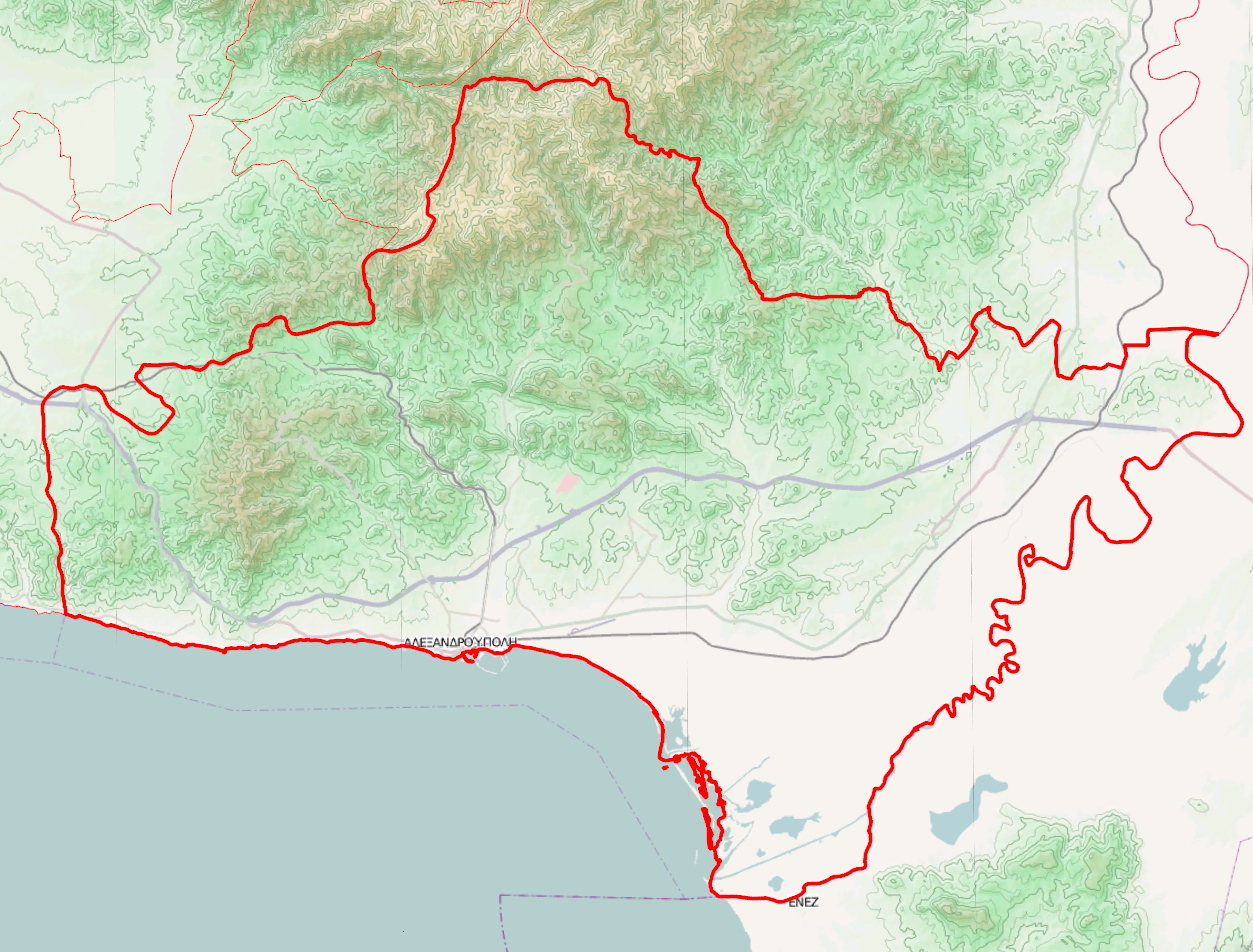 Τοπογραφικός χάρτης του Δήμου Αλεξανδρούπολης (2011)